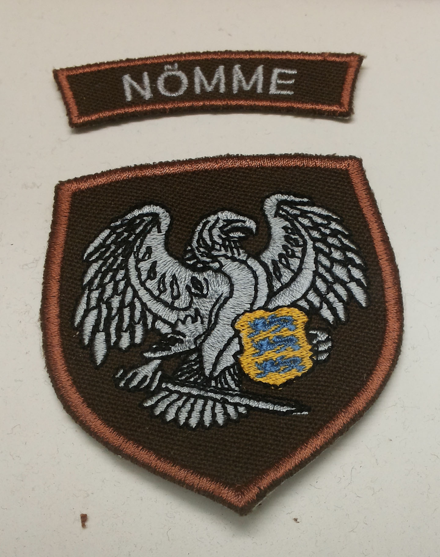 Nõmme Kaitseliidu varrukaembleem tavavormile